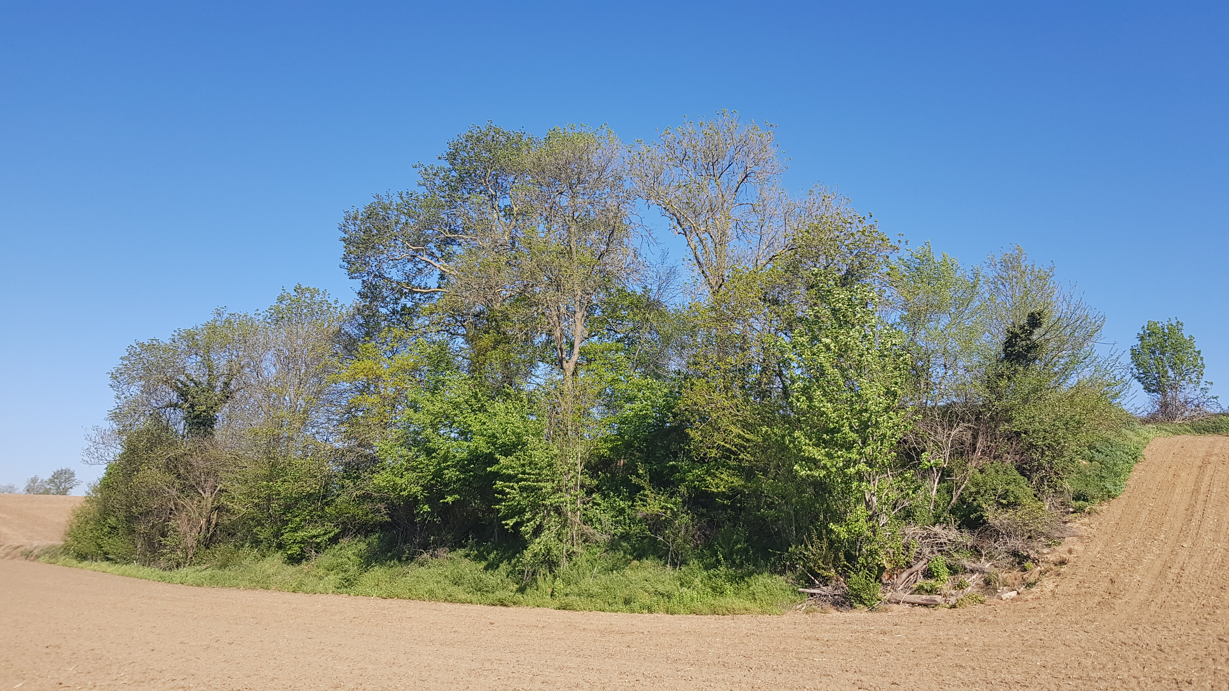 Auvermansboschke, Valkenburg aan de Geul, Nederland